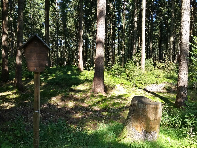 Naturschutzgebiet Friedrichsheider Hochmoor